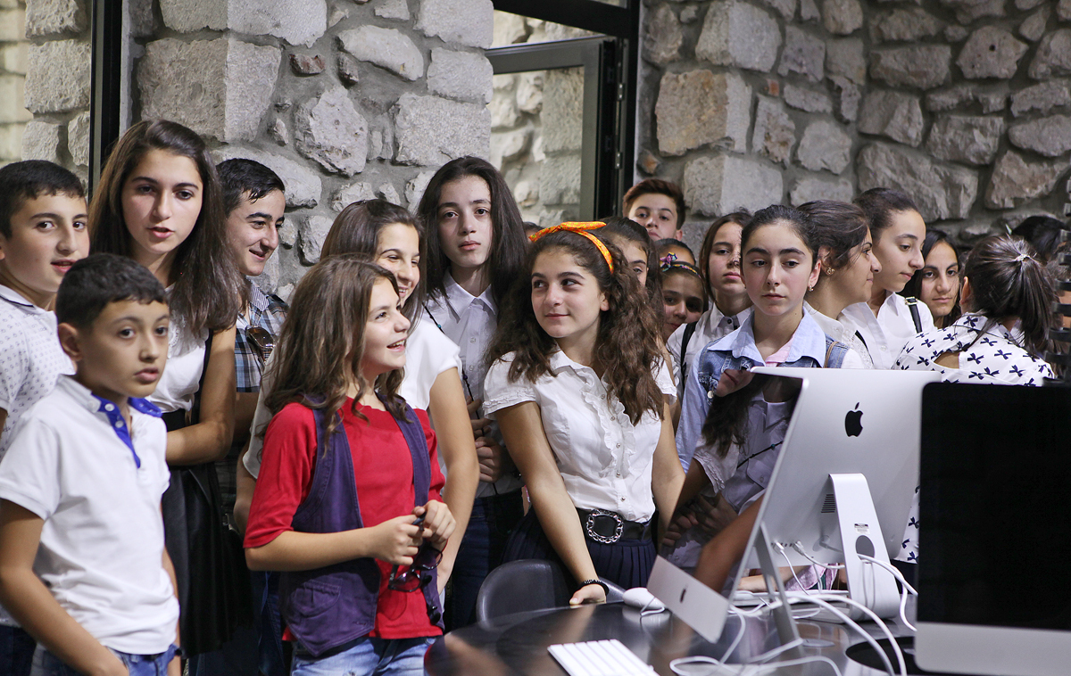 ԹՈՒՄՈxՀԲԸՄ համագործակցության արդյունքում Թումո ծրագիրը հասանելի դարձավ Արցախի պատանիների համար